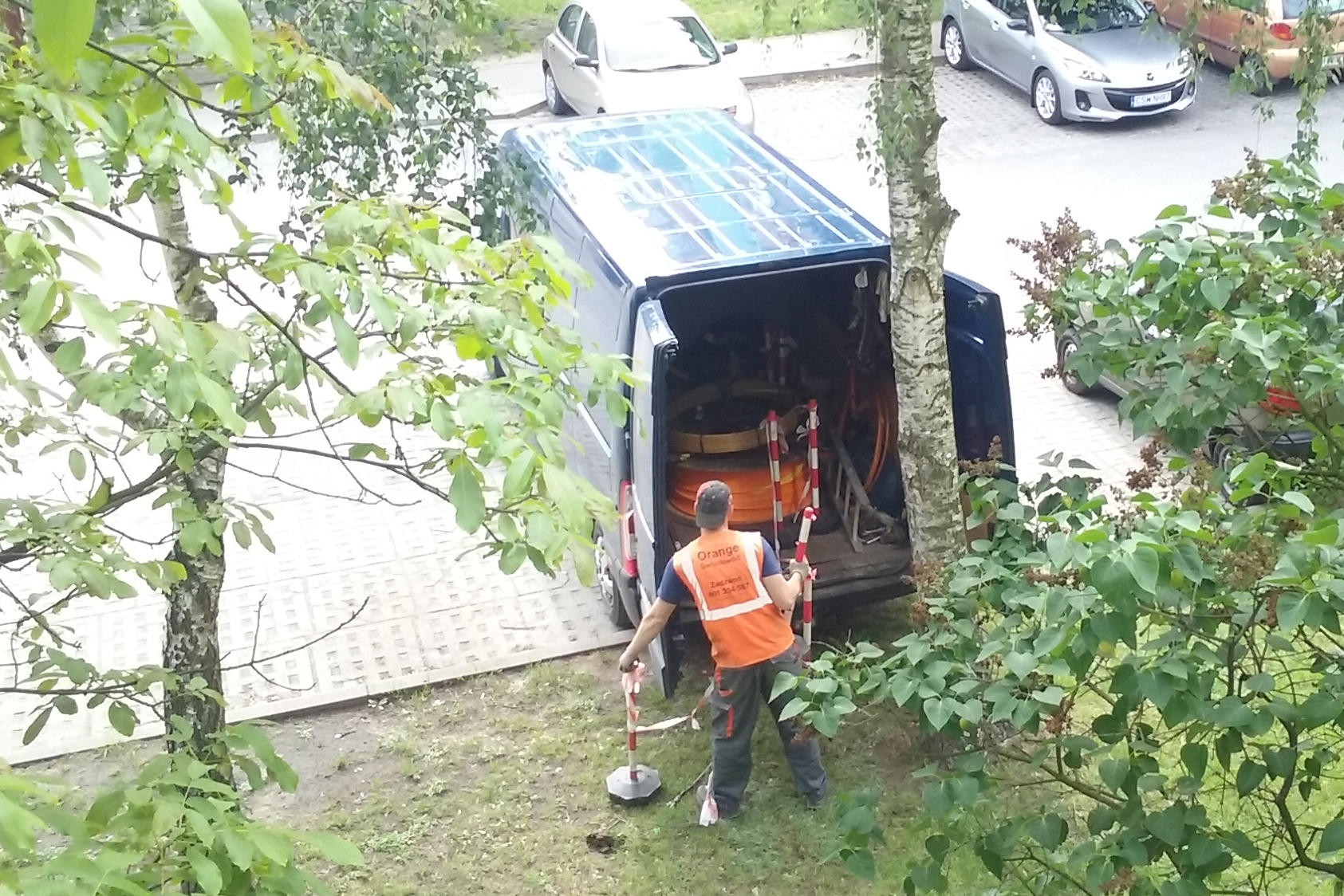 Monterzy Orange w trakcie instalacji światłowodu na osiedlu Hubala I w Tomaszowie Mazowieckim, w województwie łódzkim, PL, EU. CC0